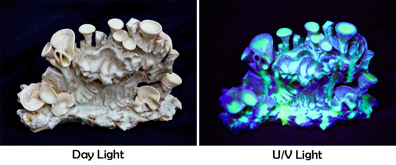 Sencer Sarı'nın 2012 yılında yaptığı Anemons In Red isimli kişisel sergisinden (isimsiz) bir çalışma. cone 04 beyaz şamot kil üzerine cone 02 U/V fosforlu uranyum sırı 26 cm x 37 cm